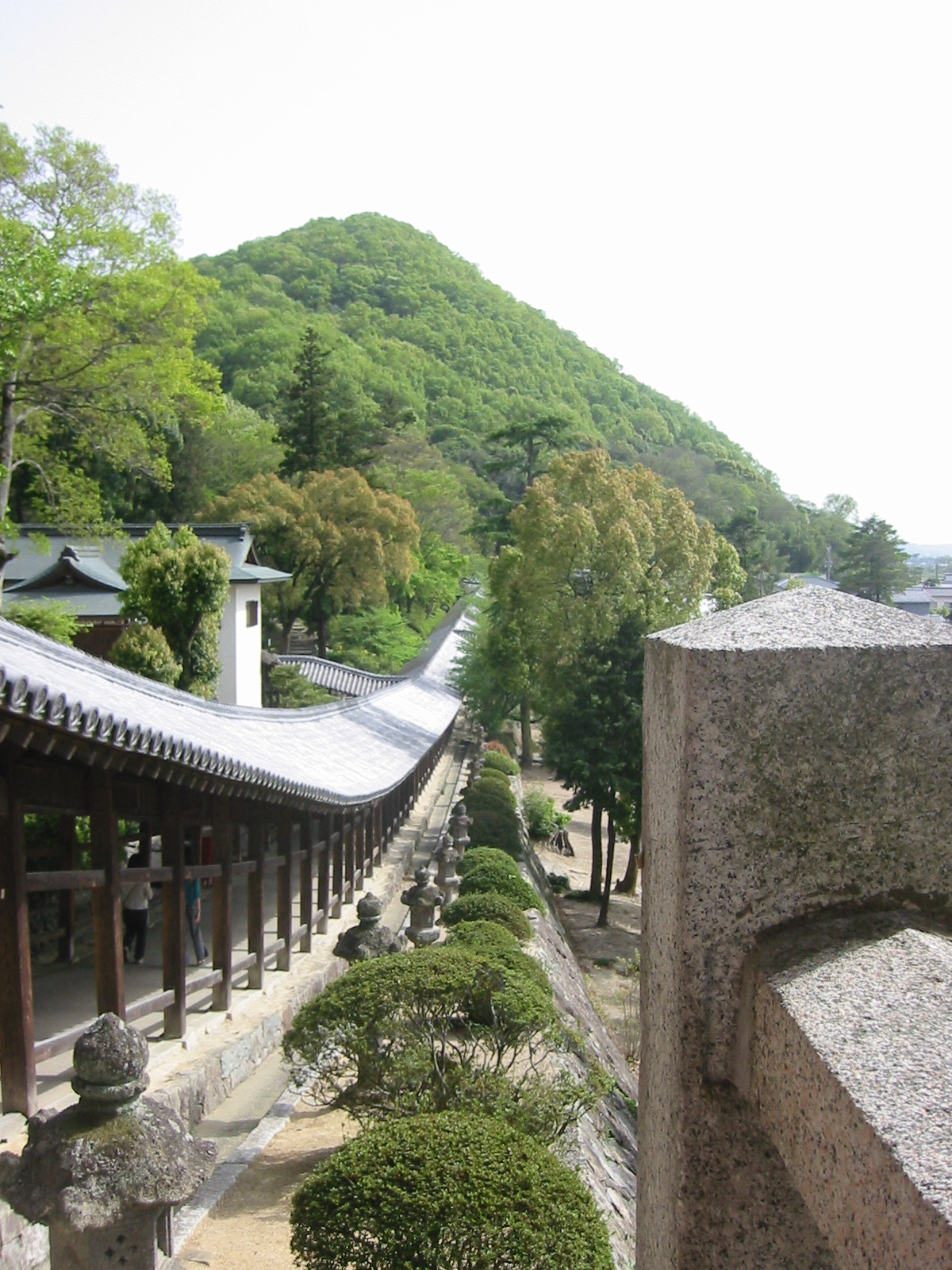 岡山県吉備津神社